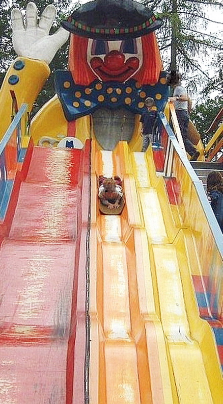 Lizenz